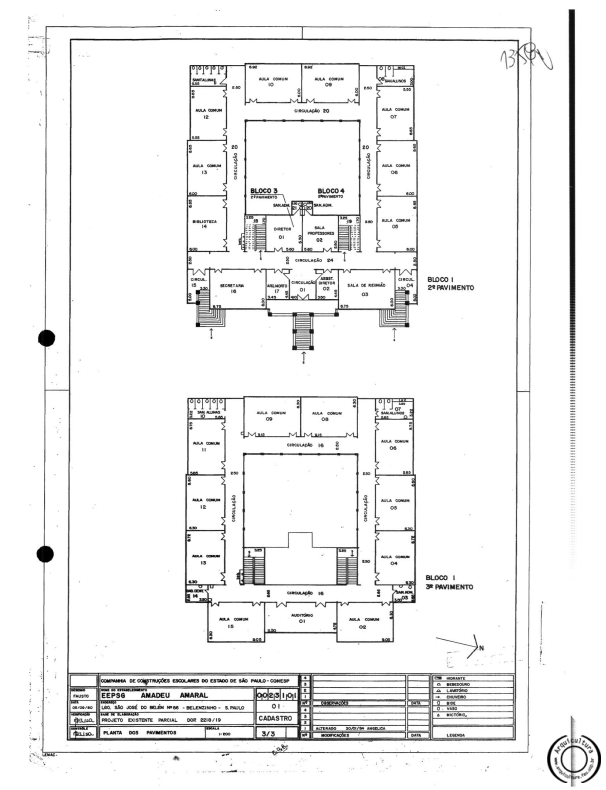 O projeto da escola foi desenhado pelo carioca Hypolito Gustavo Pujol Júnior. A imagem faz parte do acervo do Projeto Arquicultura, da FAU/USP.